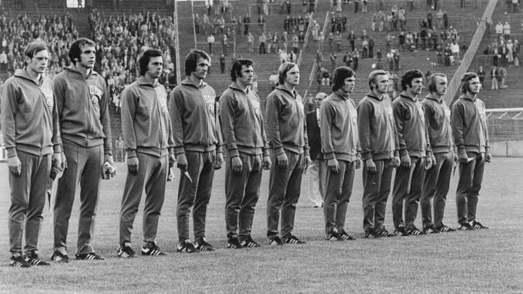 ADN-ZB Mittelstädt 15.6.74 BRD-Hamburg: X. Fußball-Weltmeisterschaft. 1. Finalrunde, Gruppe 1: DDR-Australien 2:0 (am 14.6.74). Die DDR-Nationalmannschaft kurz vor dem Spielbeginn. Vlnr: Kapitän Bernd Bransch, Torwart Jürgen Croy, Jürgen Sparwasser, Harald Irmscher, Eberhard Vogel, Gerd Kische, Jürgen Pommerenke, Siegmar Wätzlich, Wolfram Löwe, Joachim Streich und Konrad Weise. Information added by Wikimedia users.